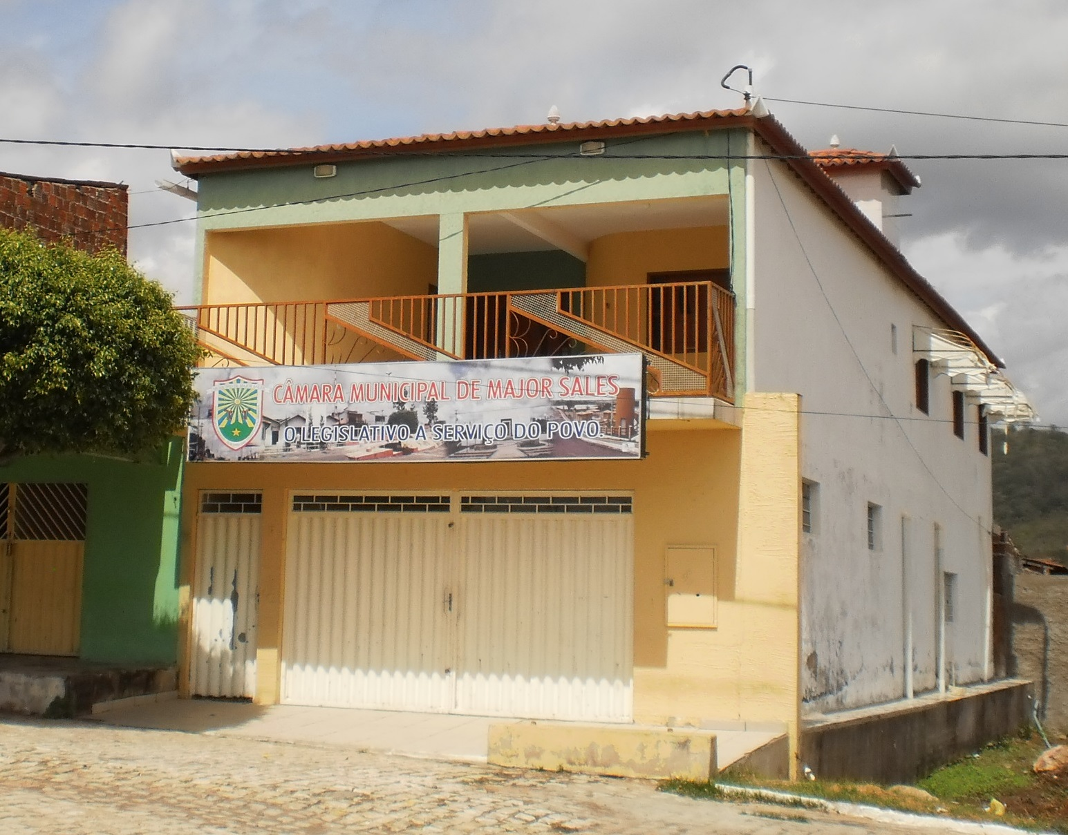 Câmara Municipal de Major Sales, sede do poder legislativo major-salense. Rio Grande do Norte, Brasil.